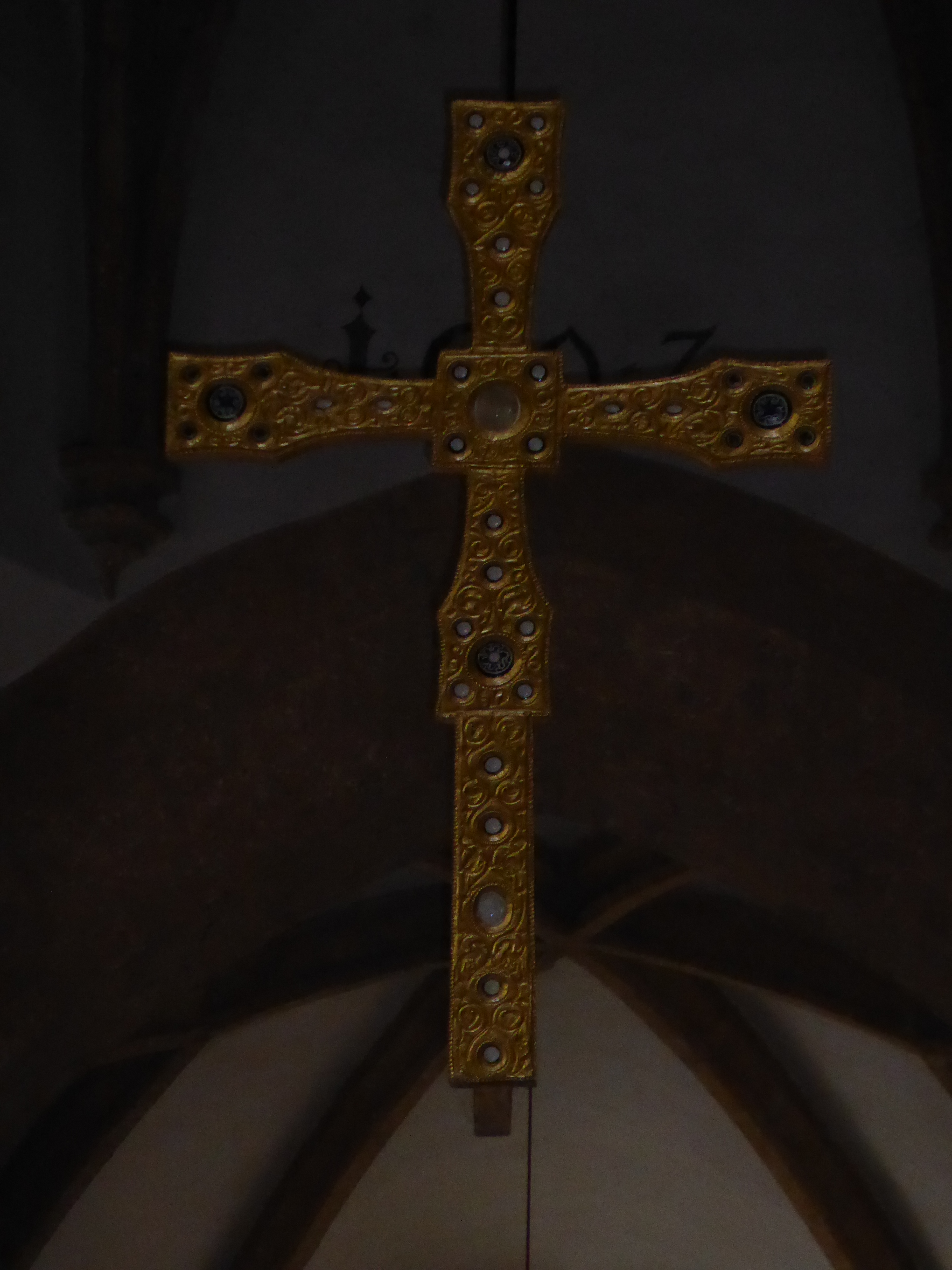 Kath. Pfarrkirche hl. Maximilian